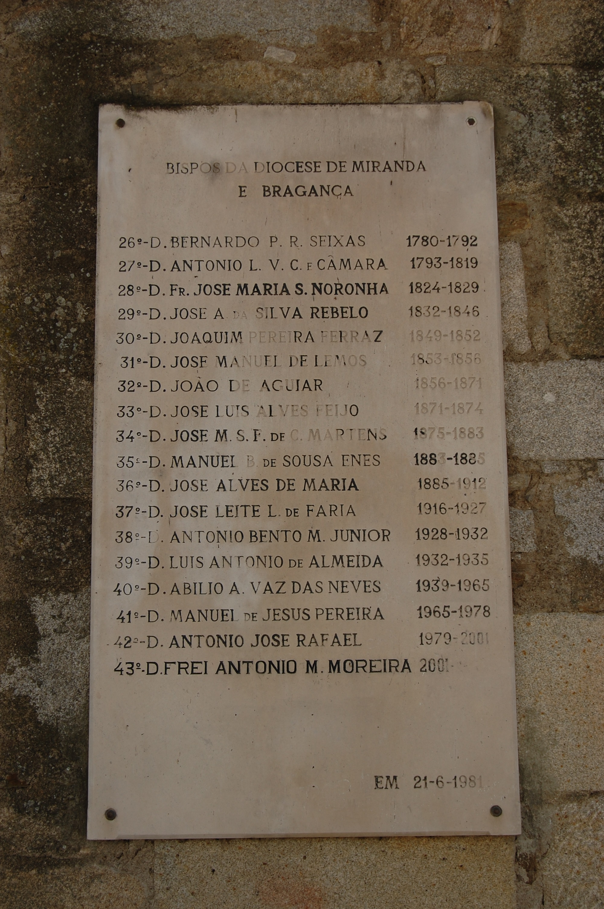 Miranda do Douro, Portugal.